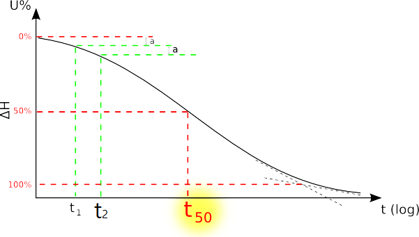 Curva di consolidazione e dimostrazione grafica per il calcolo del t50.